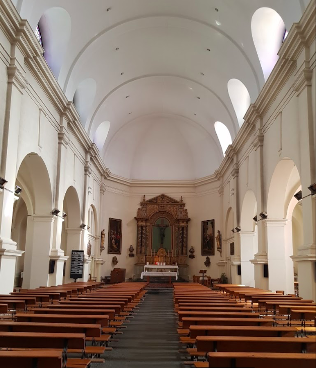 Représentation de l'intérieur de l'église, du décor général et du maître autel.